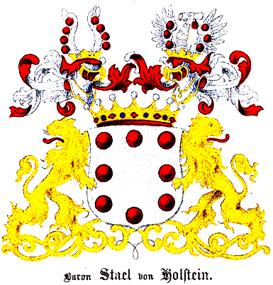 Familienwappen derer Baron Staël von Holstein